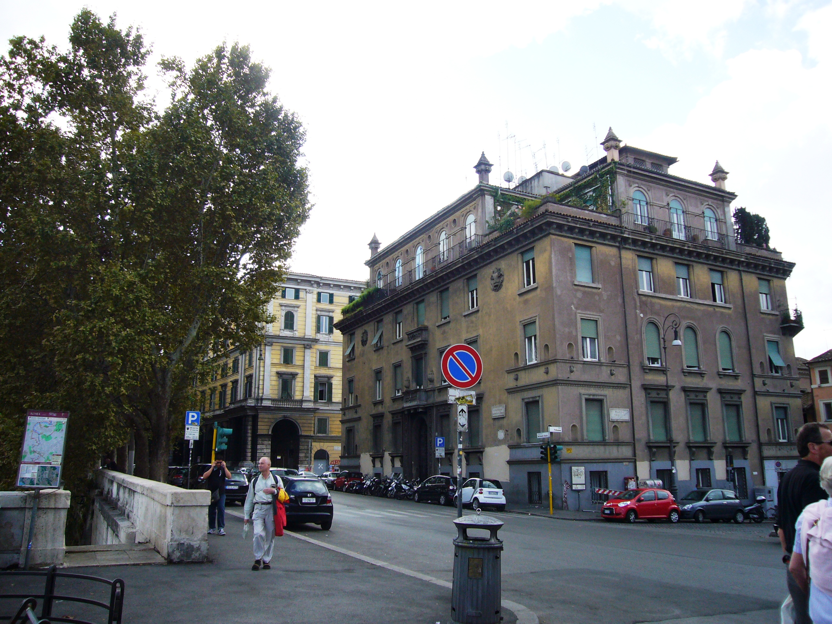 Roma, lungotevere Raffaello Sanzio a piazza Trilussa